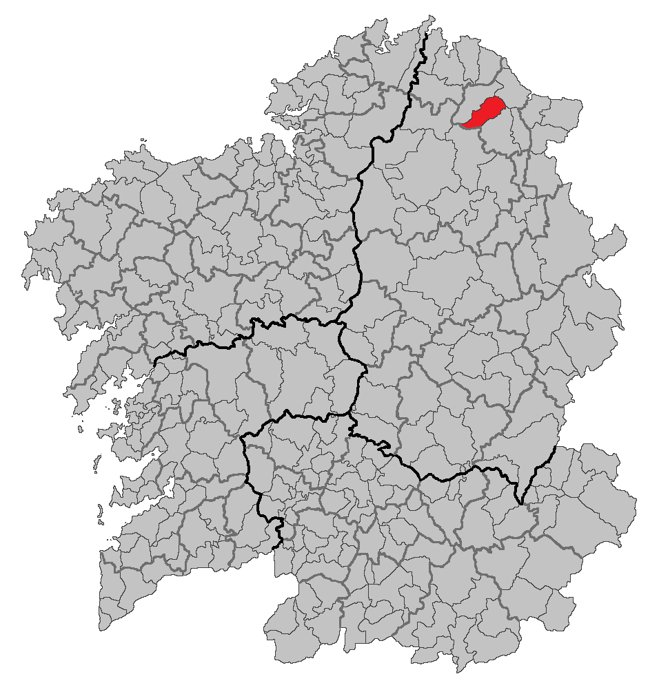 Mapa coa localización do concello de Alfoz.